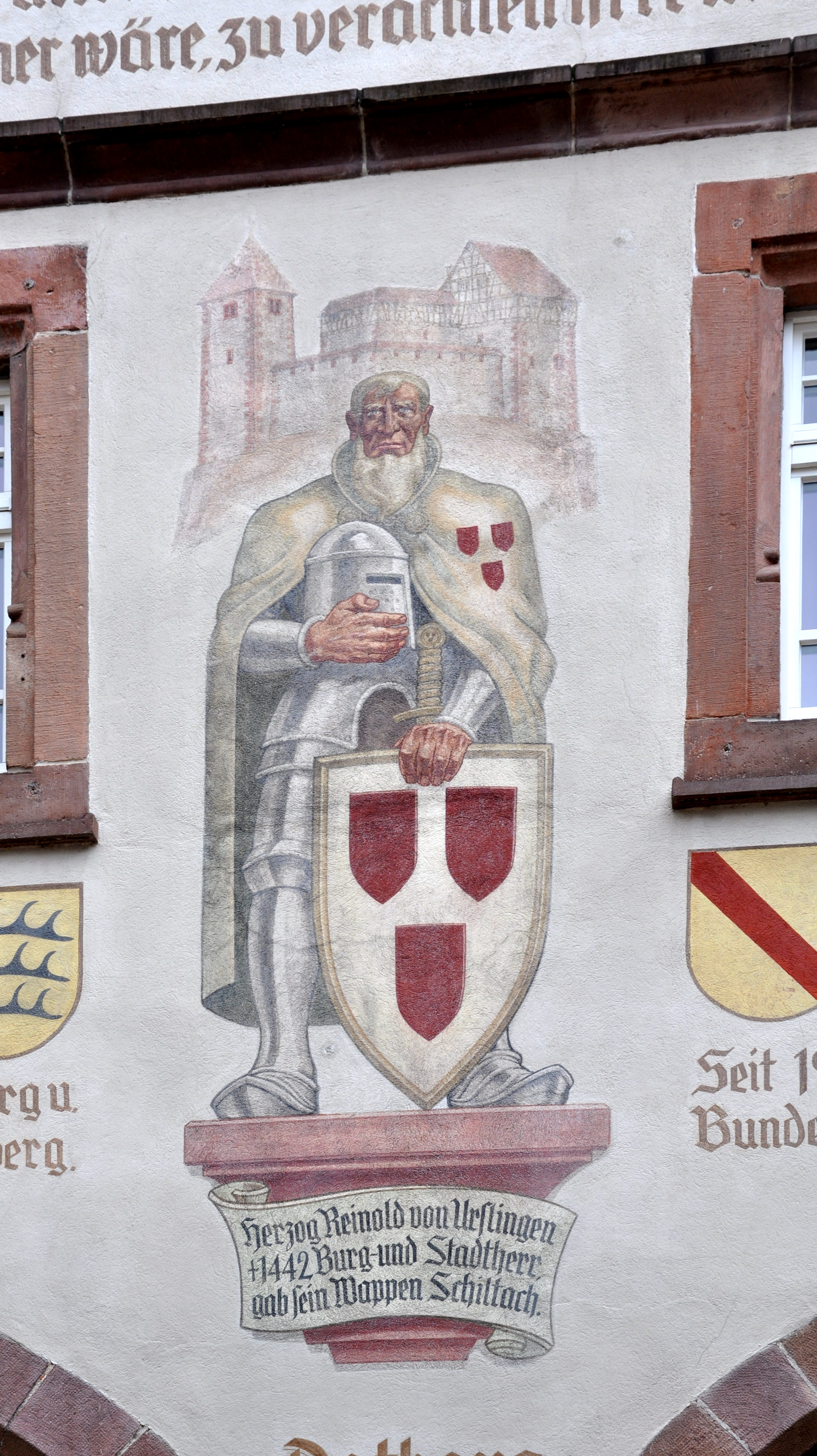 Schiltach, Rathaus, Fassade mit Bemalung von Eduard Trautwein, 1942